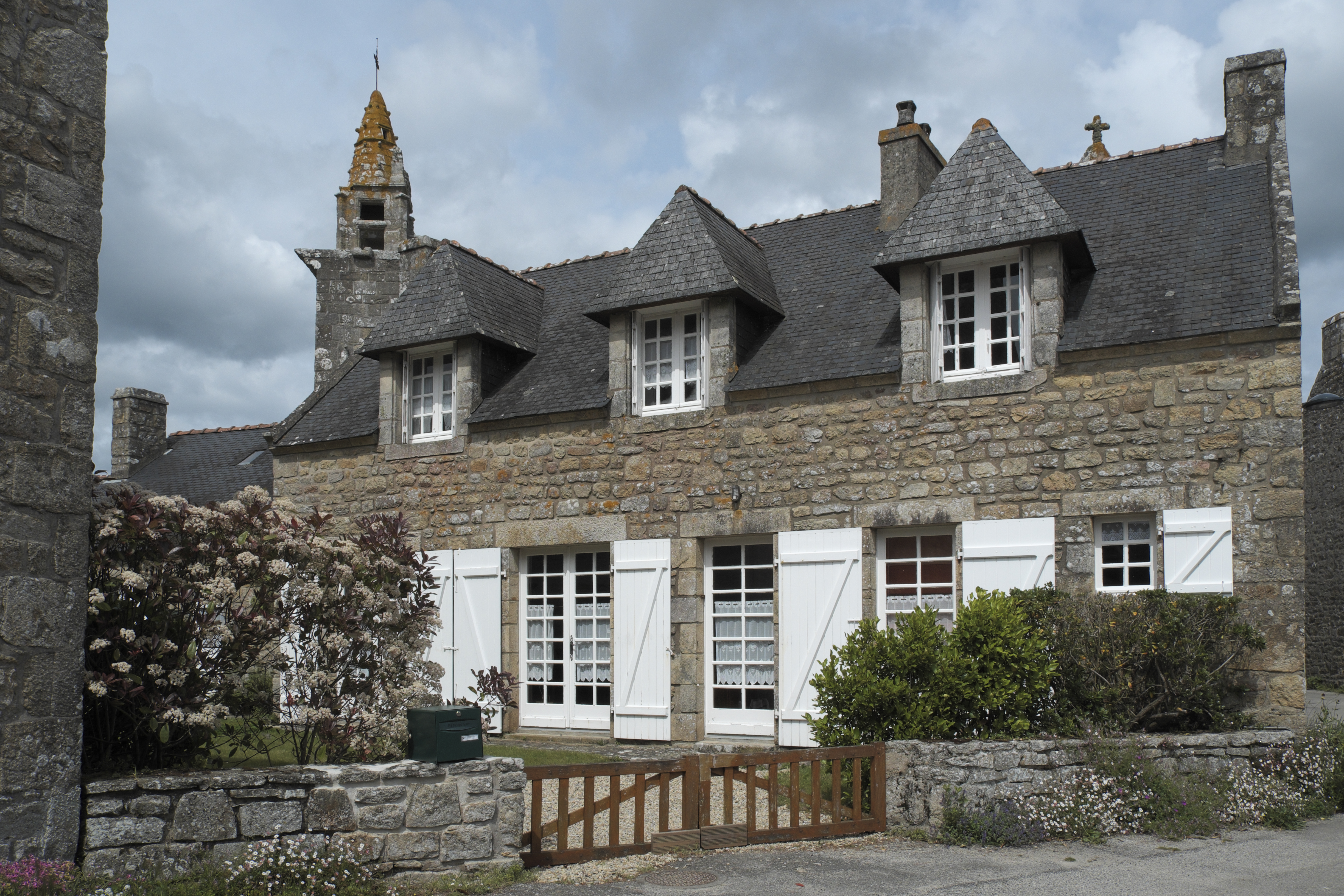 Landhaus in Saint-Colomban, einem Ortsteil von Carnac im Département Morbihan (Region Bretagne/Frankreich)